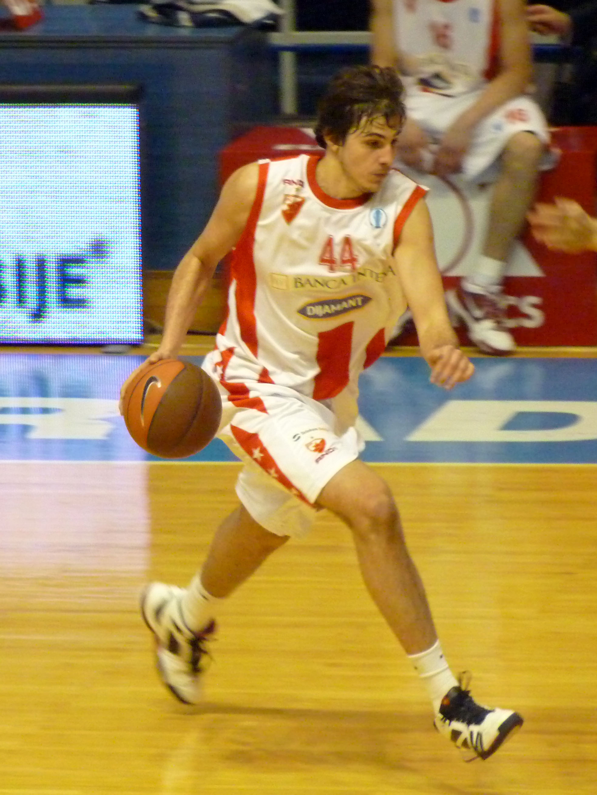 == Лиценца: ==